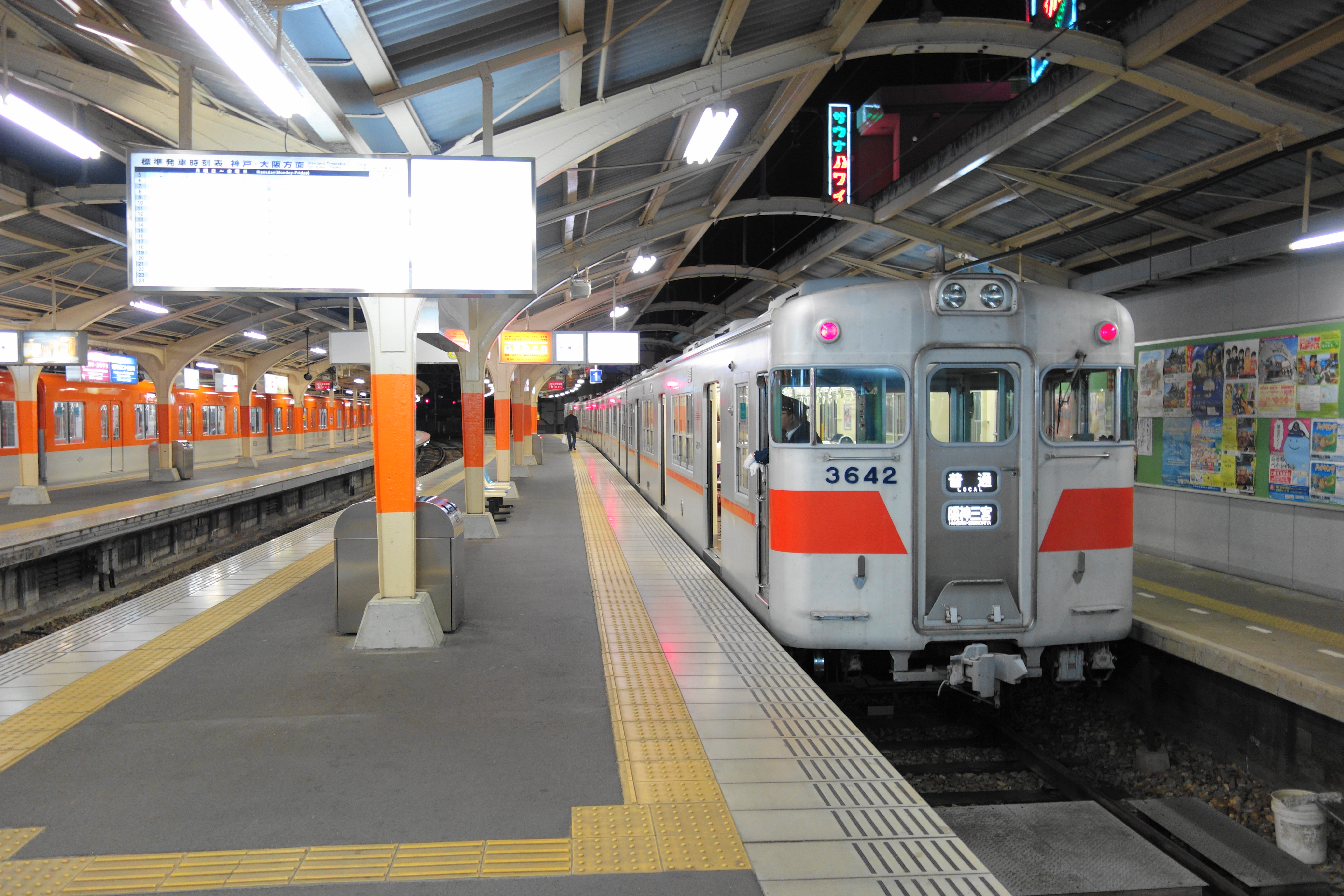 山陽電鉄3050系 3642 （3074F） （山陽姫路駅・2013年5月3日撮影）